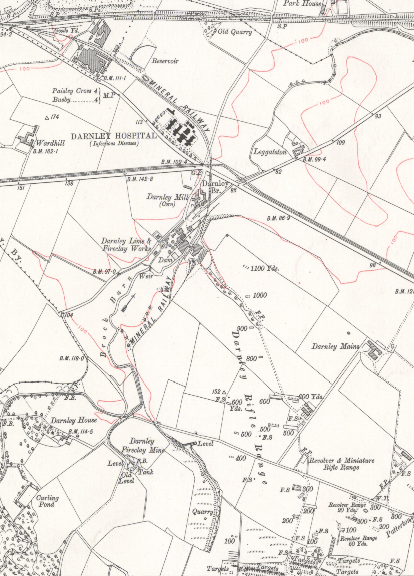 Darnley Lime Works on 1915 edition Ordnance Survey map, Renfrewshire Sheet XII.SE (incl. Eastwood; Neilston; Paisley). Publication date: 1915